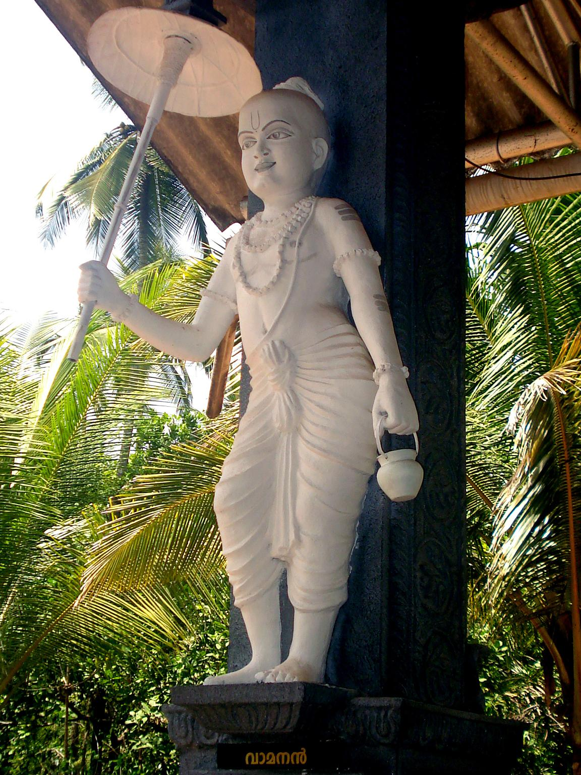 മഹാവിഷ്ണുവിന്റെ പത്ത് അവതാരങ്ങളിൽ അഞ്ചാമത്തെതാണ് വാമനൻ. ചിത്രം എടുത്തത് കേരളത്തിൽ കണ്ണൂർ ജില്ലയിലെ കൂടാളി താറ്റിയോട്ട് അമ്പലത്തിൽ നിന്നാണ്.